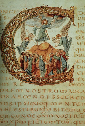 Image de la majuscule C du Sacramentaire de Drogon. Catégorie:Manuscrit enluminé